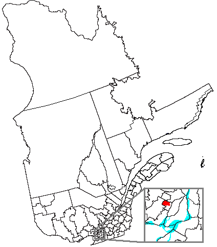 Volapük: Topam in provin: Québec.